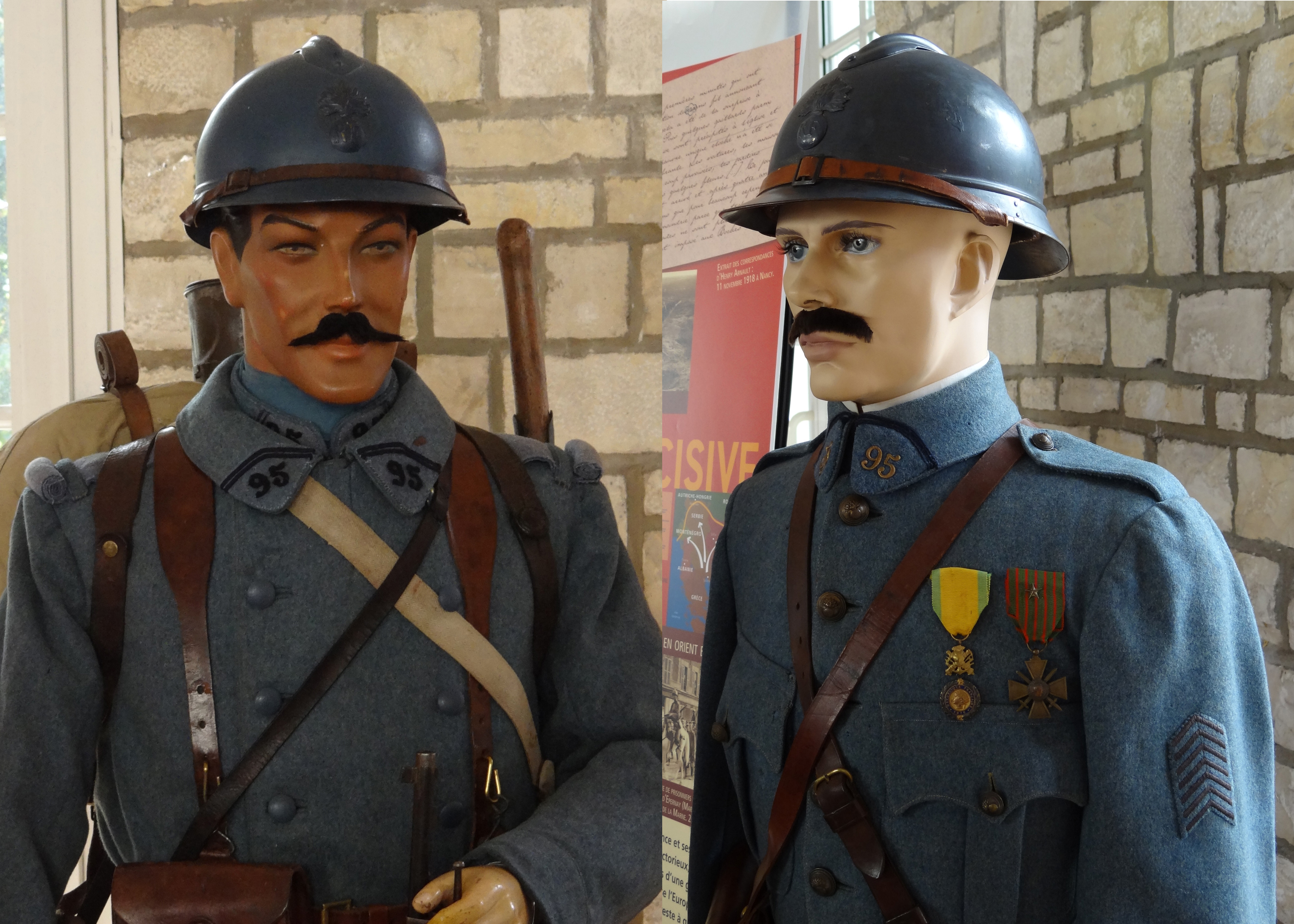 Mannequins réalisés par l'amicale du 95e RI et présentée au public lors de la commémoration du régiment le 6 septembre 2014 à Bourges en la caserne Condé.